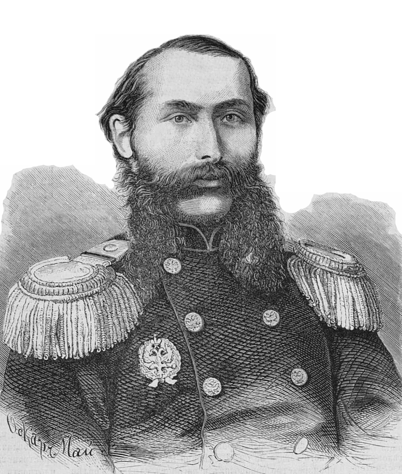 Инженер-полковник Струве Аманд Егорович, 1870 год